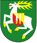 znak obce